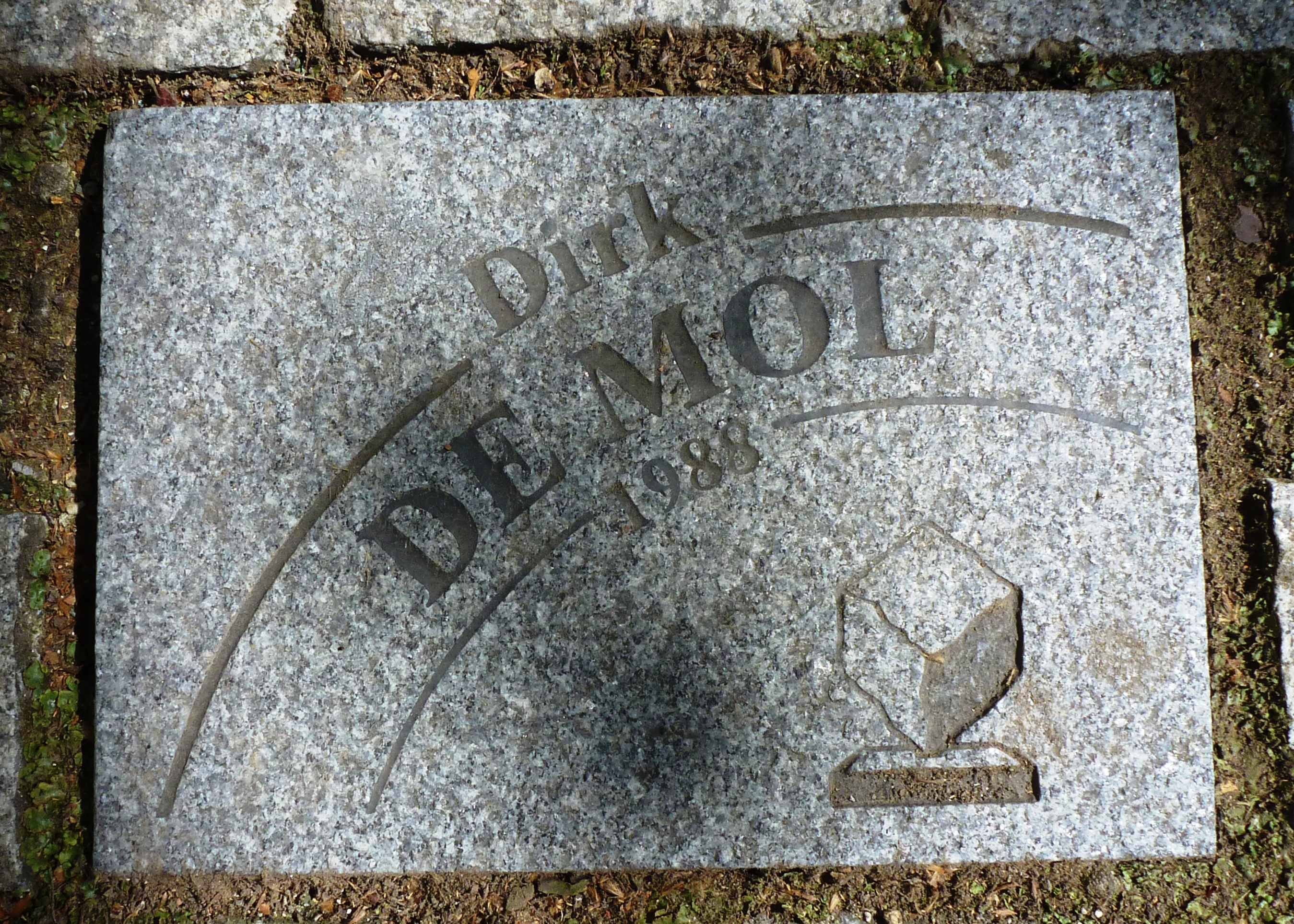 Pflasterstein für Dirk Demol auf der Allée Charles Crupelandt in Roubaix